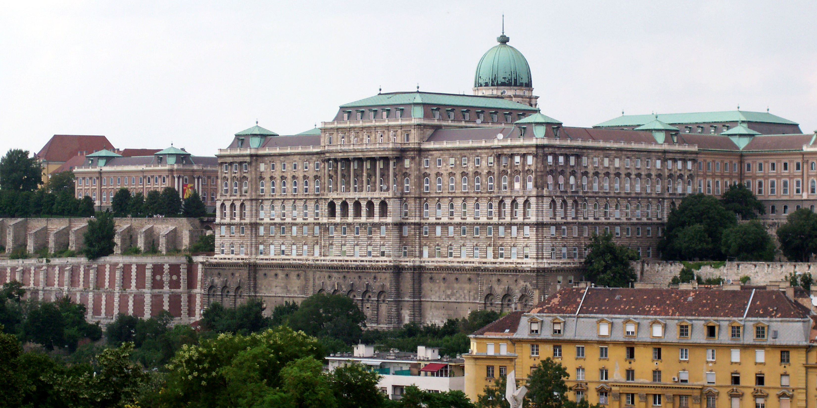 Országos Széchényi Könyvtár